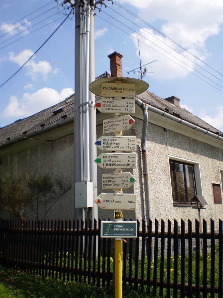 Pohořany